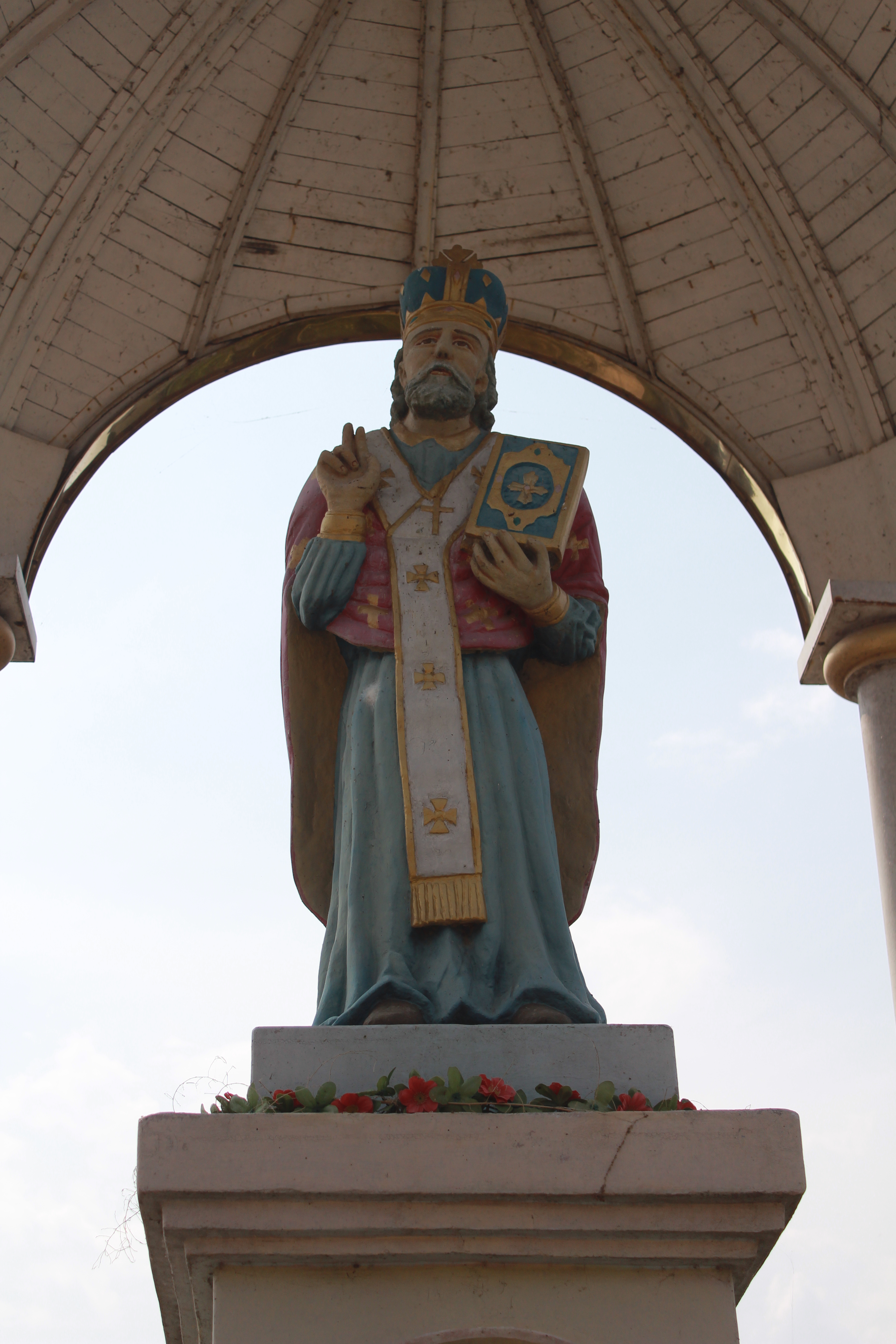 Скульптура св. Миколая 1899, с. Буряківка, Заліщицький район, Тернопільська область